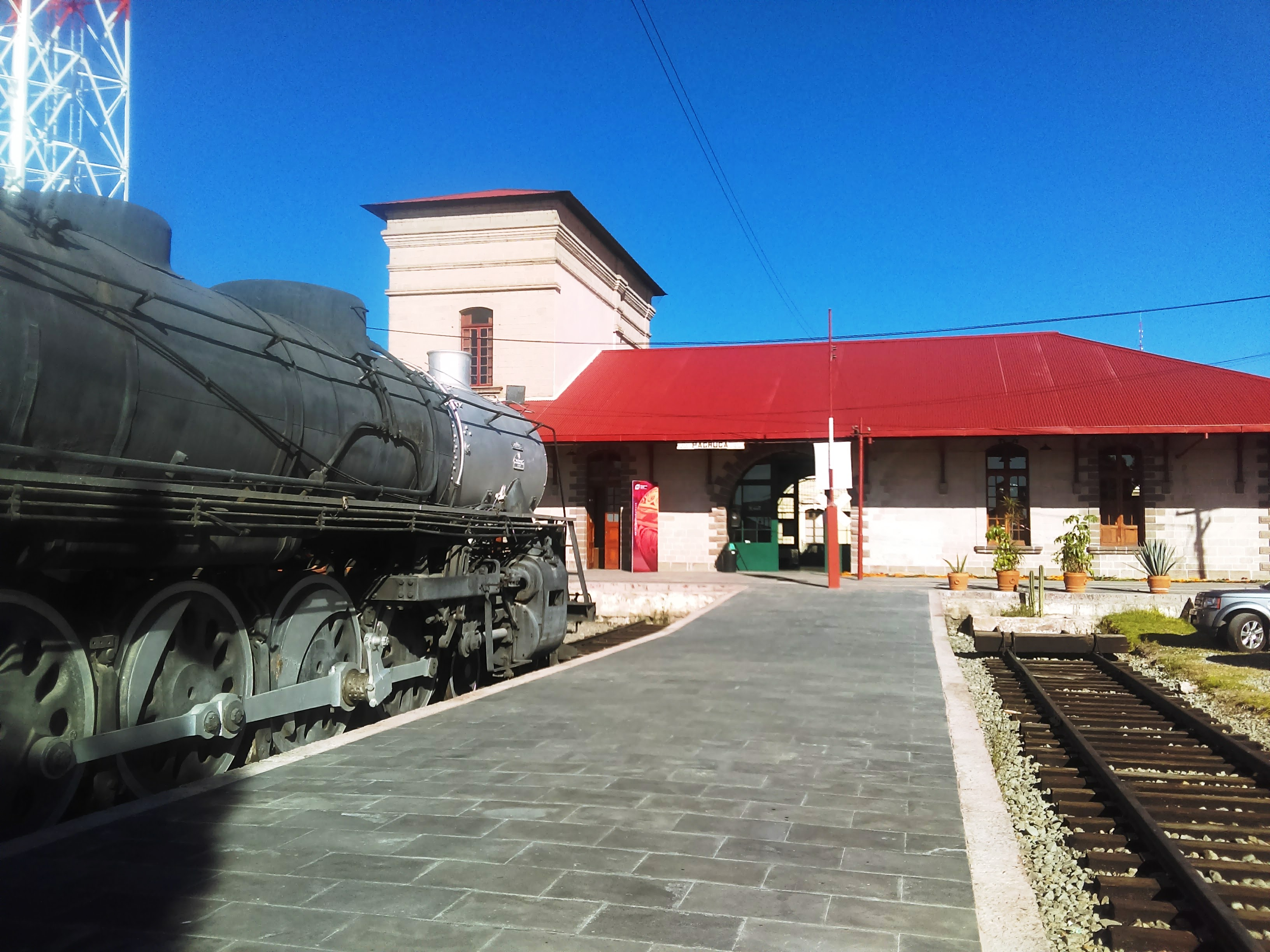 Centro Cultural del Ferrocarril en Pachuca, México